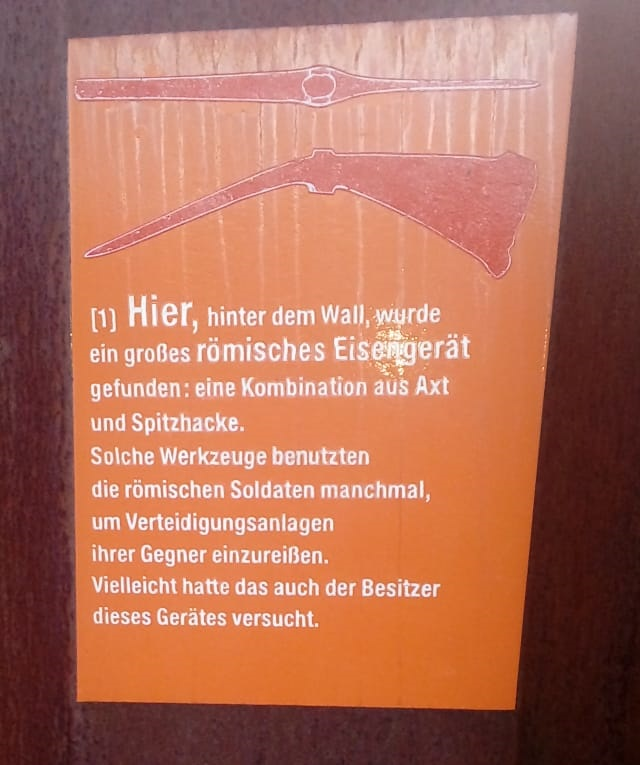 Dolabrafund am Kalkrieser "Germanenwall"